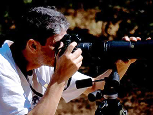 Isidoro Gallo realizando su trabajo de fotógrafo